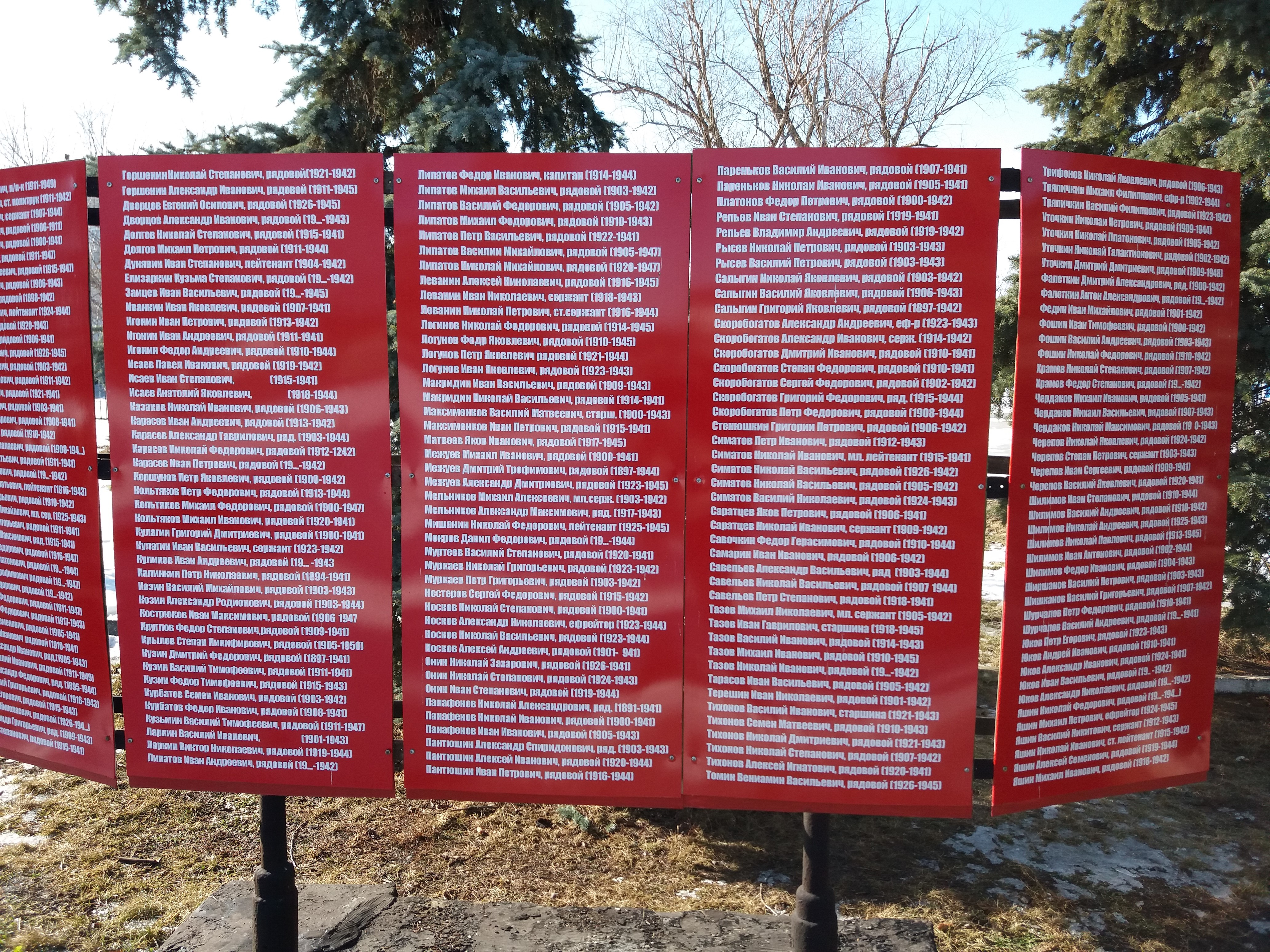 Стела с именами коржевцев погибших в ВОВ